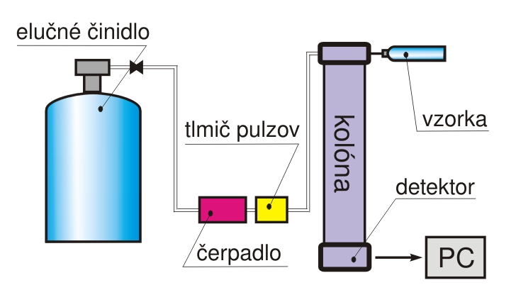 kvapalinový chromatograf